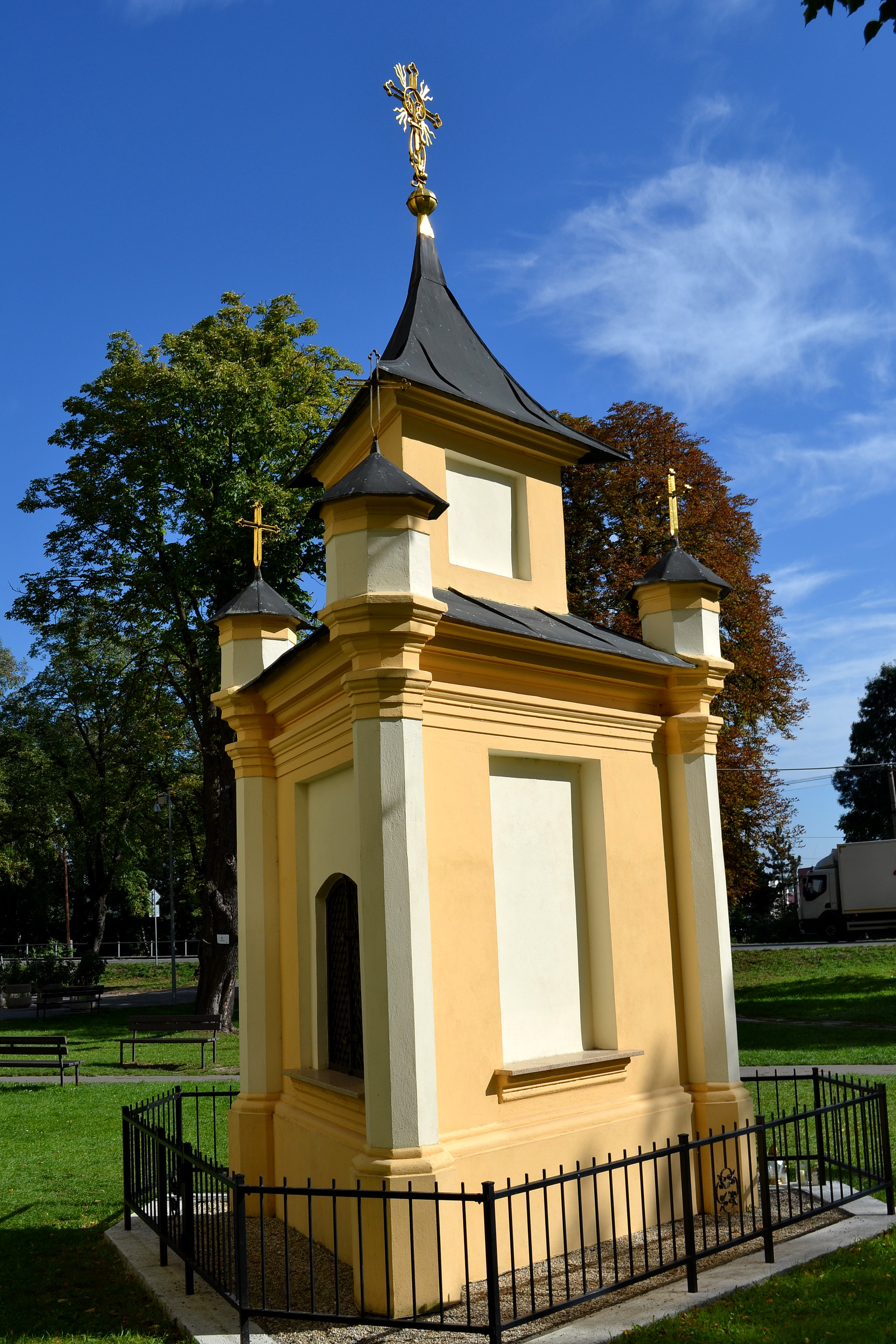 Šaštín-Stráže (okr. Senica), Bazilika Sedembolestnej Panny Márie; tzv. Trojhranná kaplnka pri východnom múre kostola